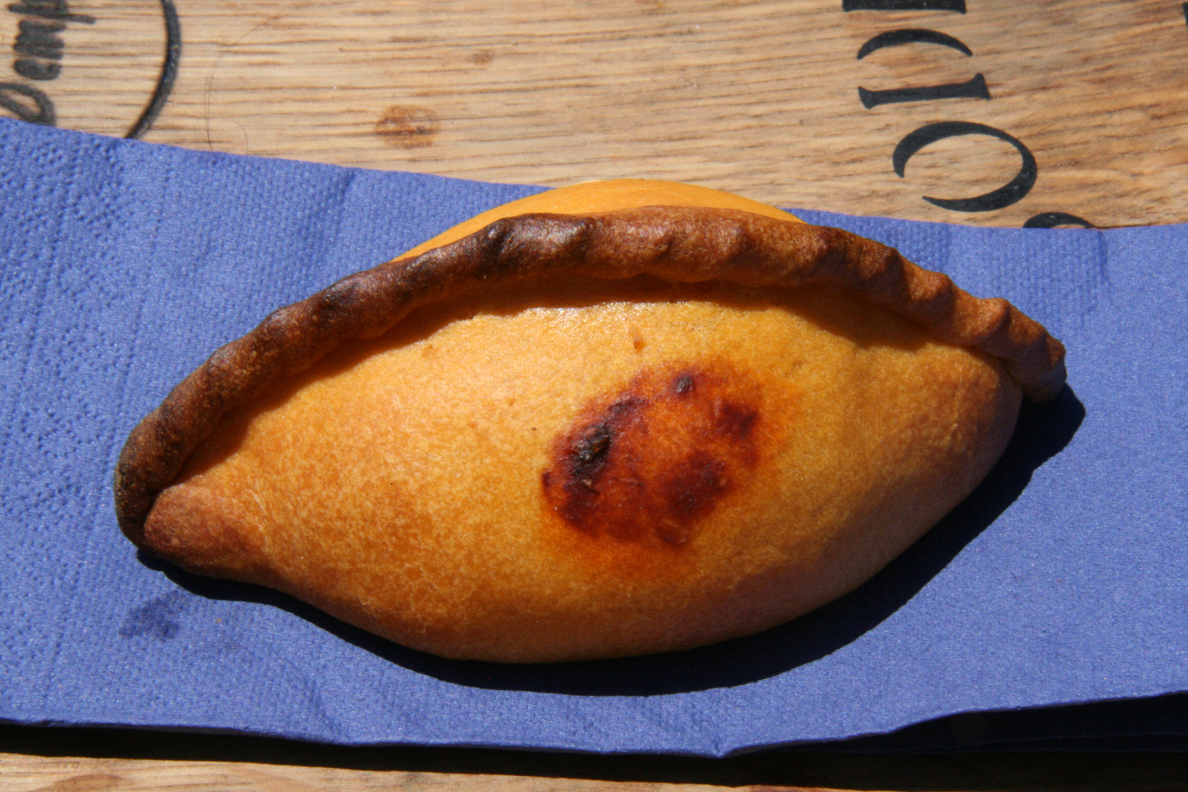 Salteña (con marca de contenido picante)